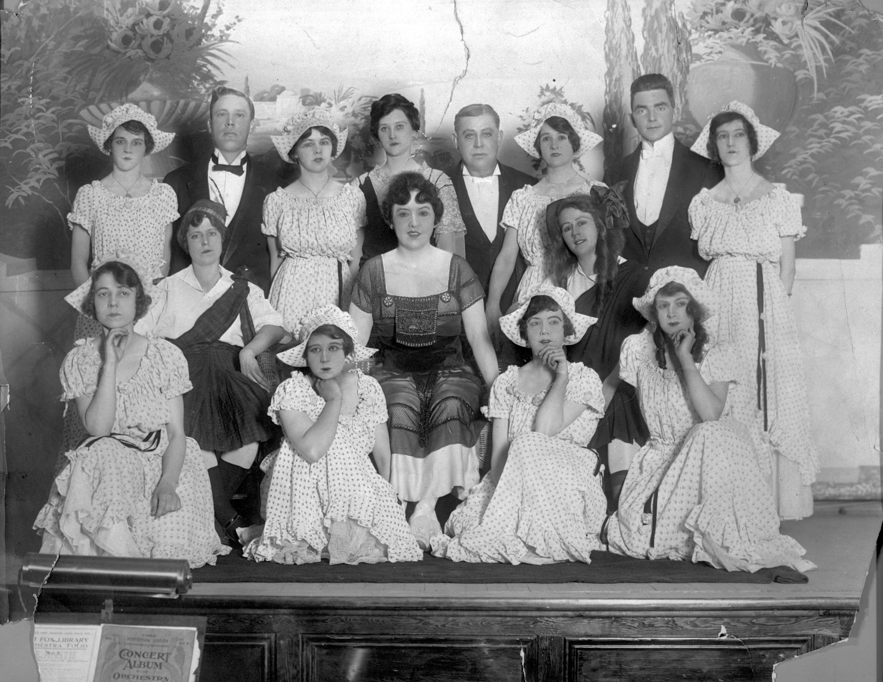 Edmonton, ca. 1915. A3242